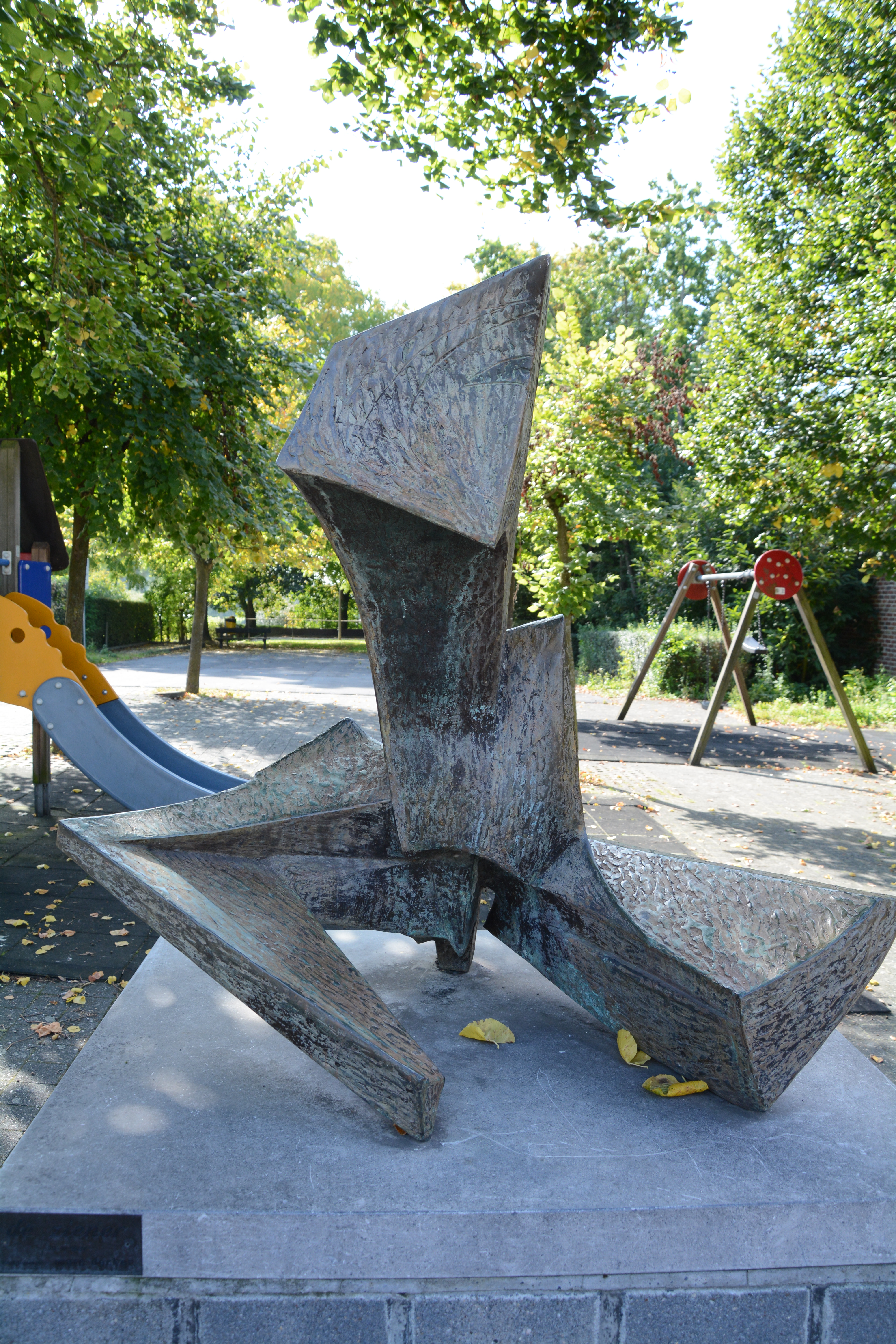 De ziener, Marc Decker, Sint-Martens-Lennik 1987